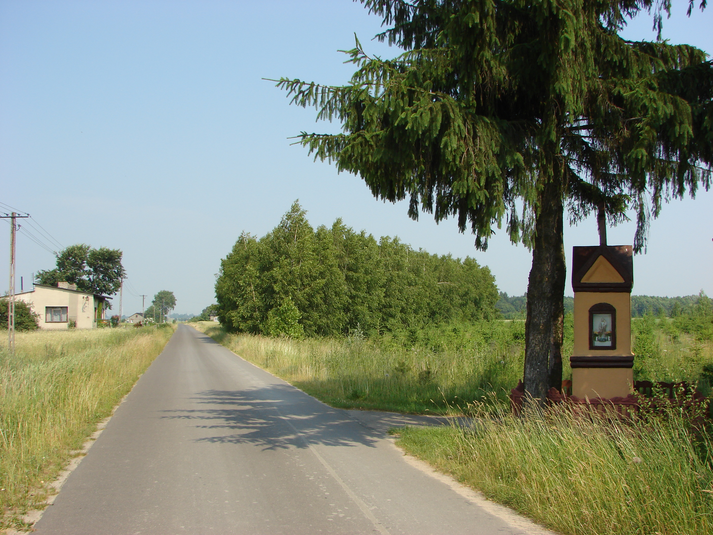 Dąbrówka, Gmina Kłodawa, kapliczka